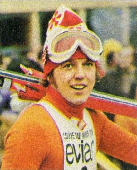 SPORT VEDETTES-PANINI 1974-Figurina n.225- ZWILLING- AUSTRIA-SPORT INVERNALI-Rec